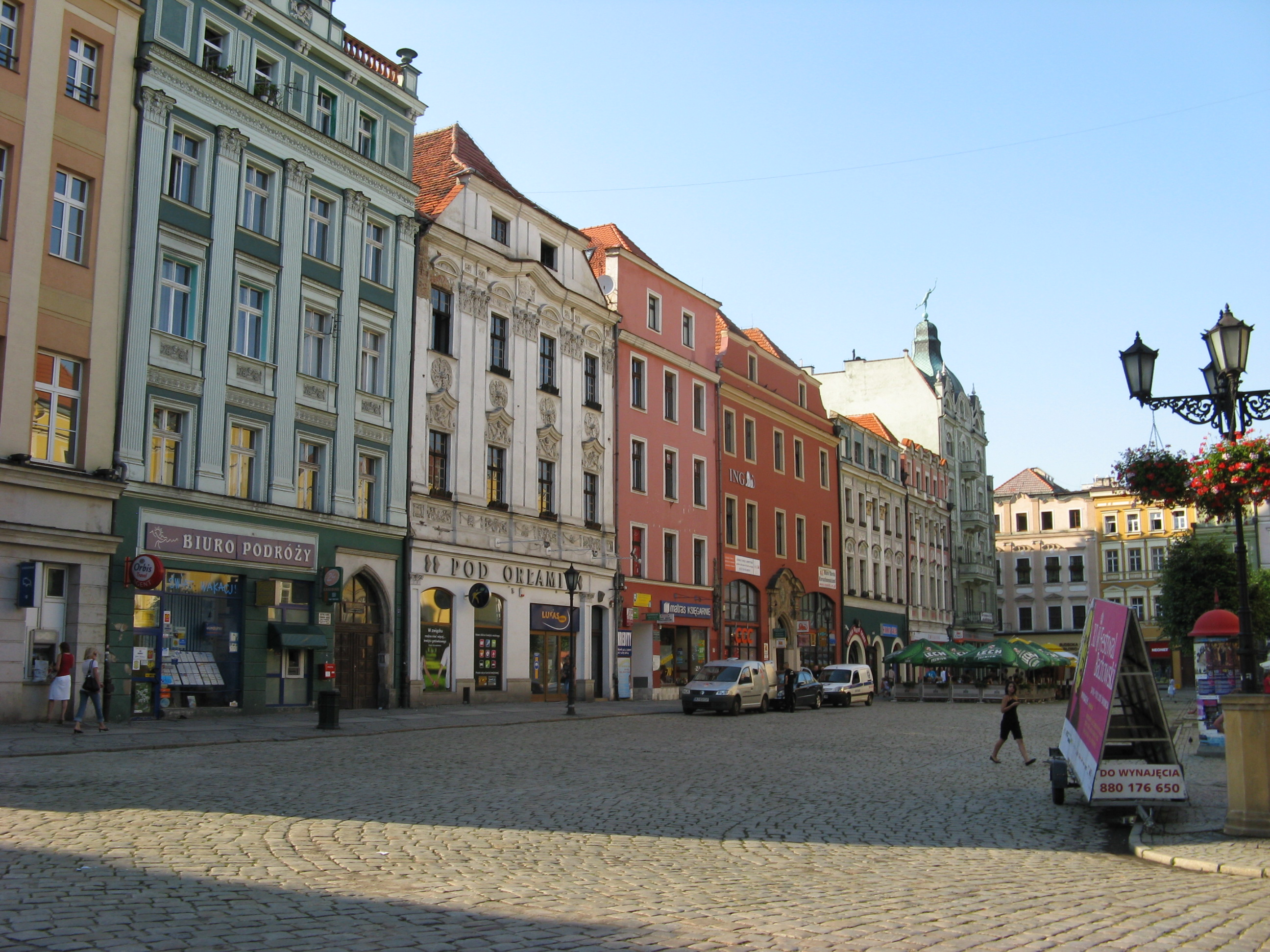 Świdnica